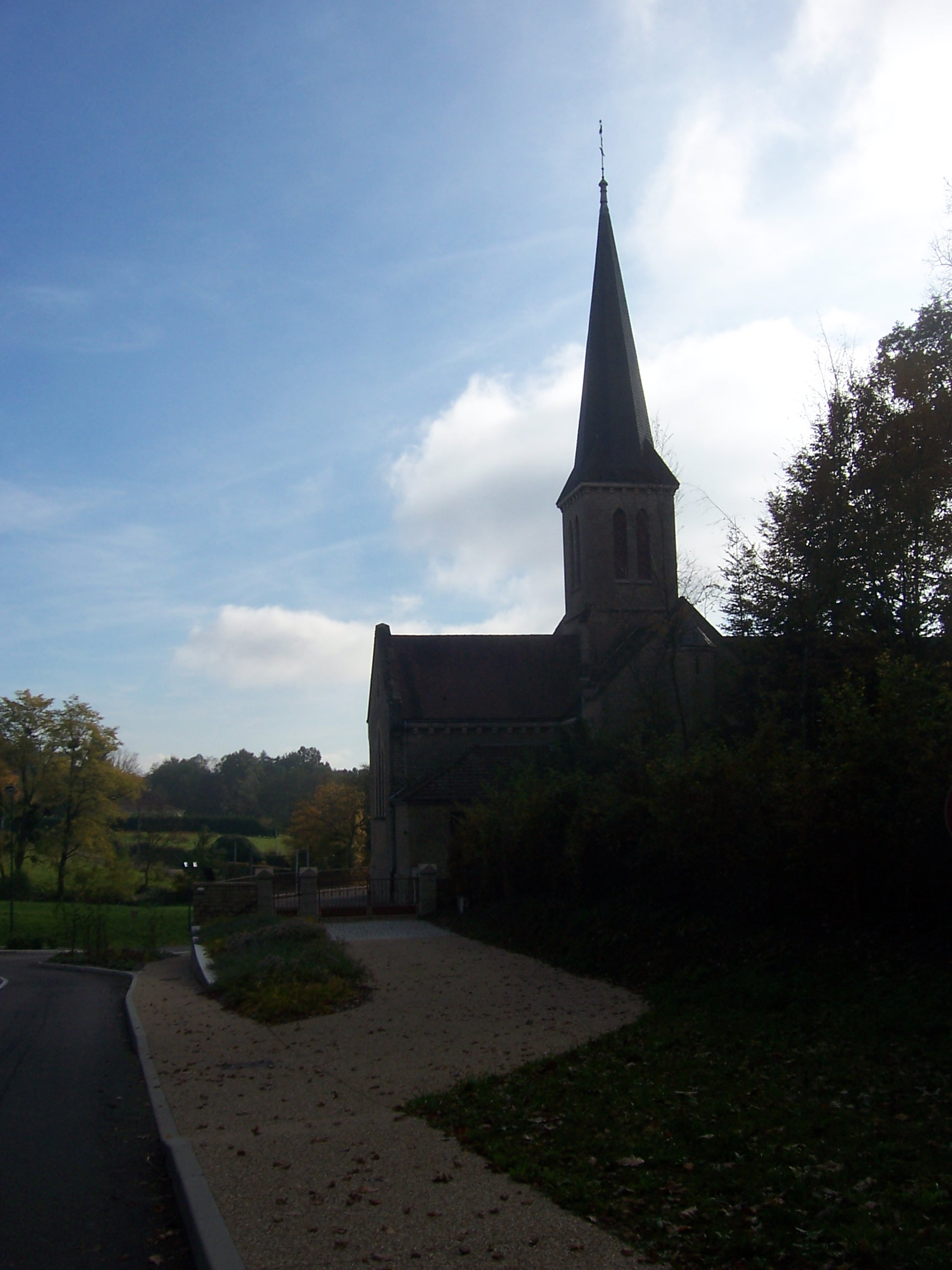 Eglise de Bruailles